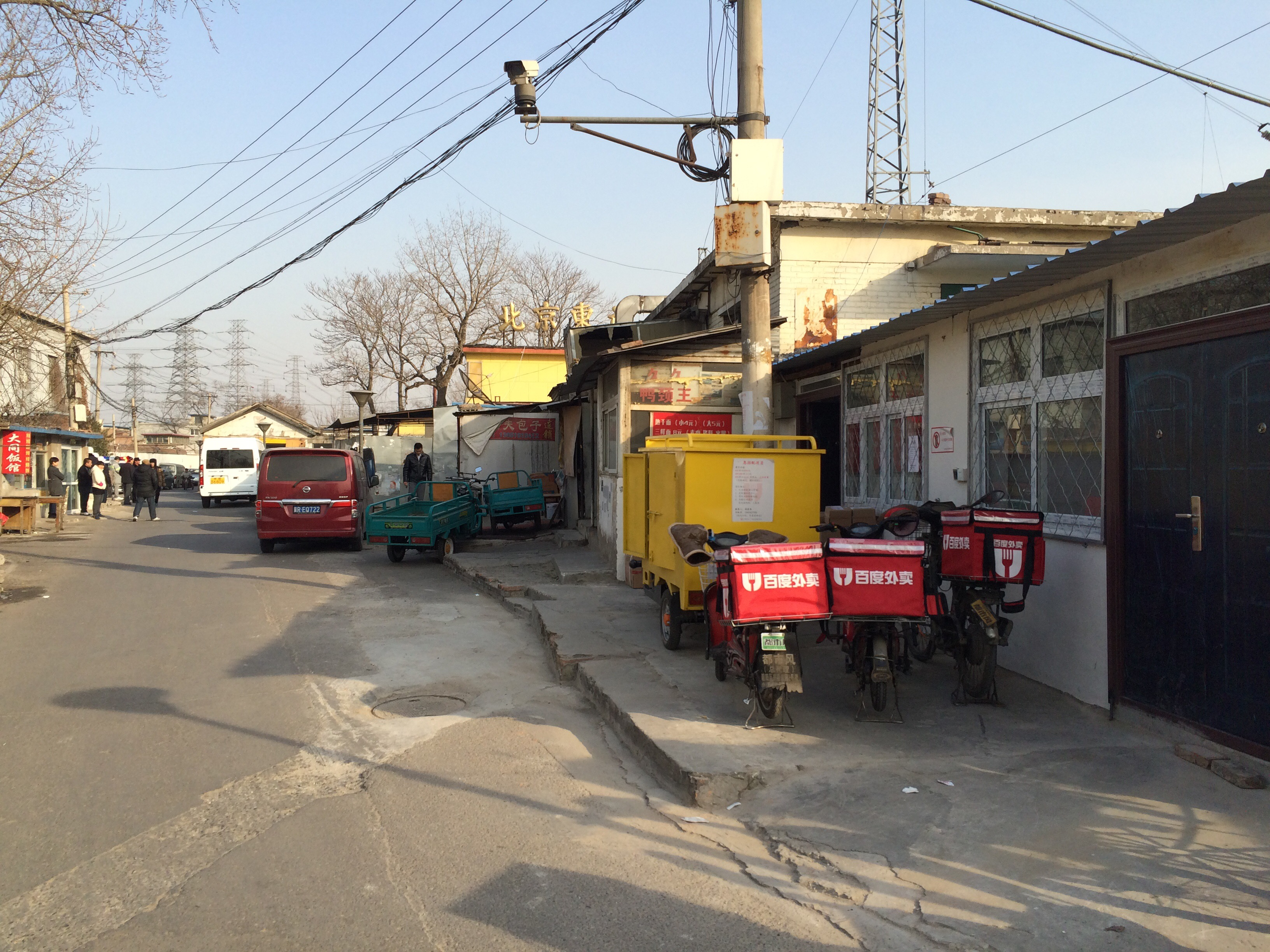 中文（中国大陆）: 北京东站，摄于2015年1月28日